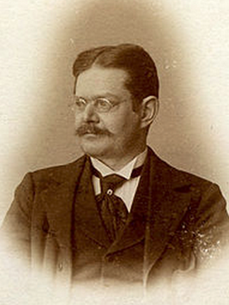 Густав Торнир (Gustav Tornier) — немецкий зоолог и палеонтолог.